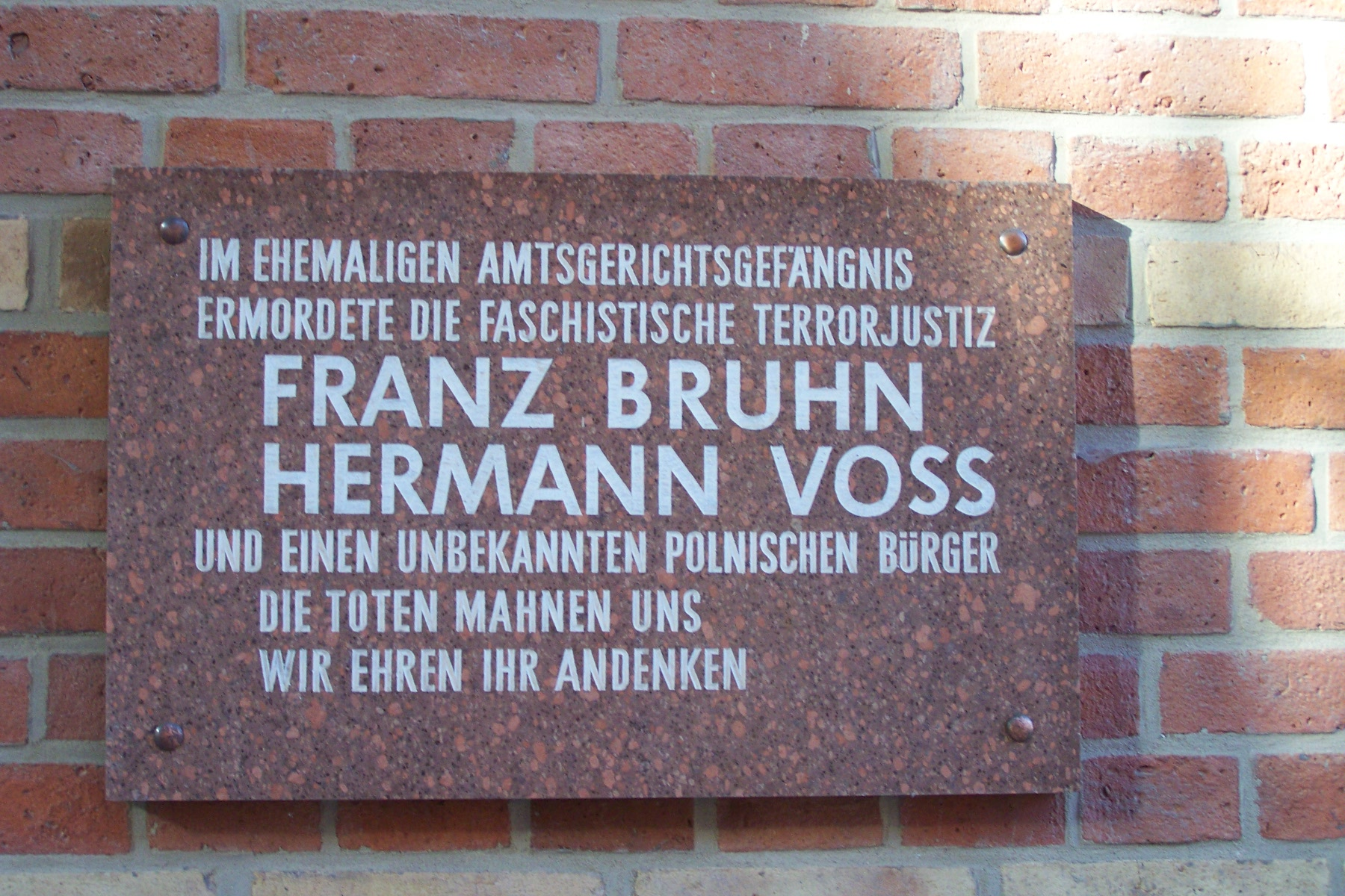 Stralsund, Gedenktafel am Amtsgericht (2008-10-10).JPG